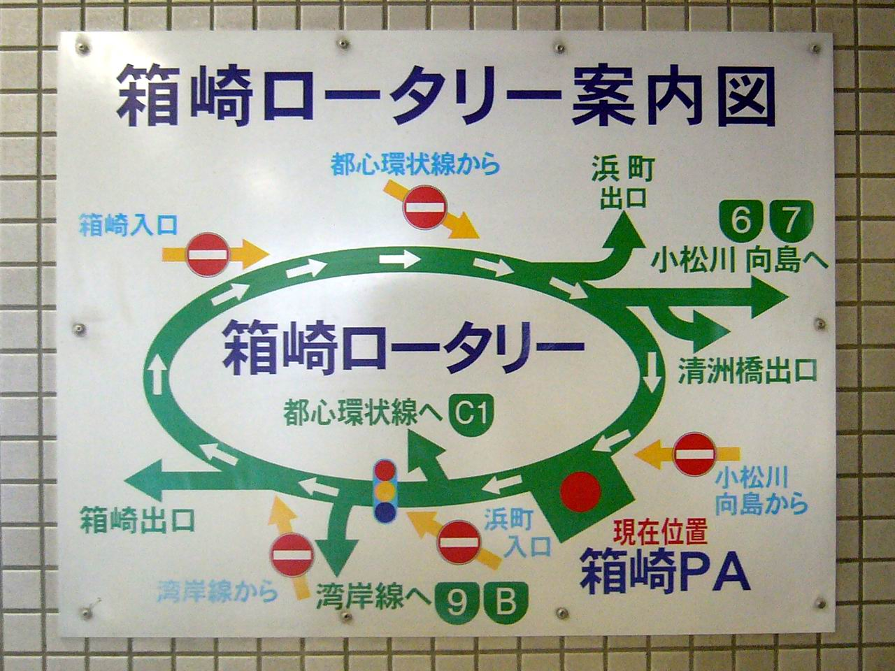 Hakozaki Rotary Map